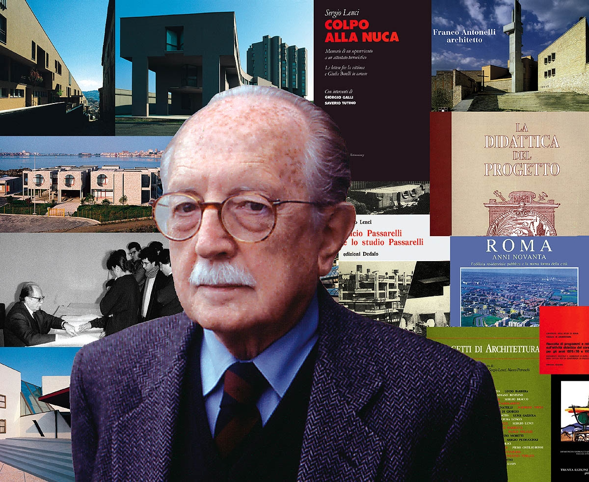 L'architetto Sergio Lenci con alle spalle alcune delle sue opere